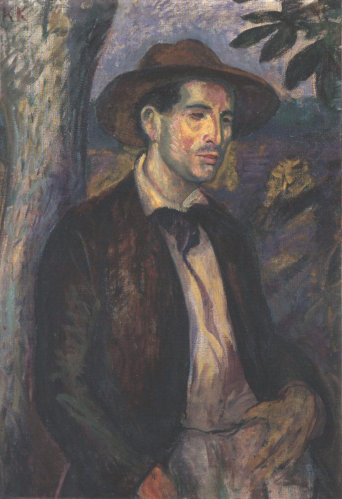 Das Bild wurde 1915 bei der Panama-Pacific International Exposition gezeigt